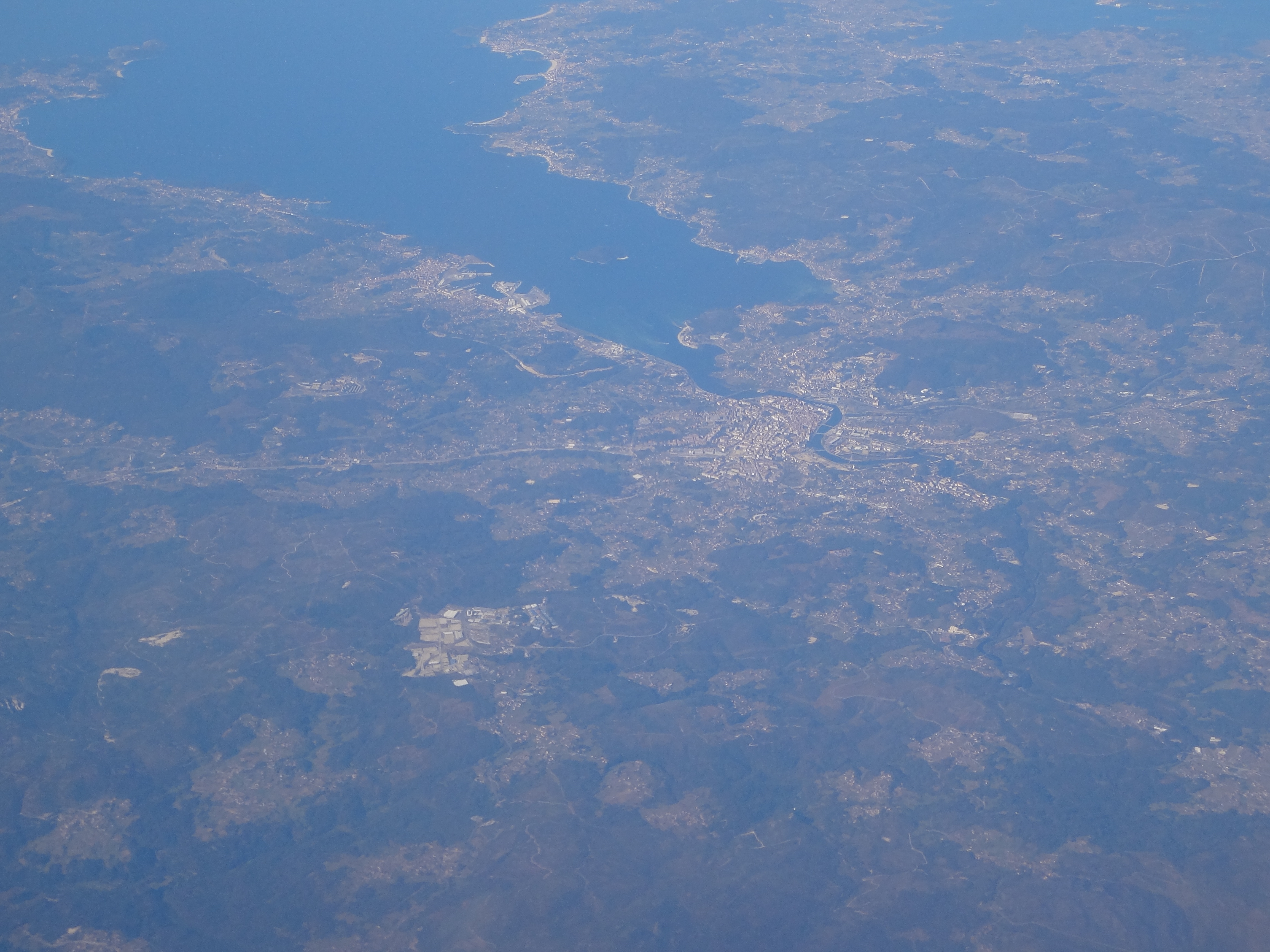 Vue aerienne de Pontevedra